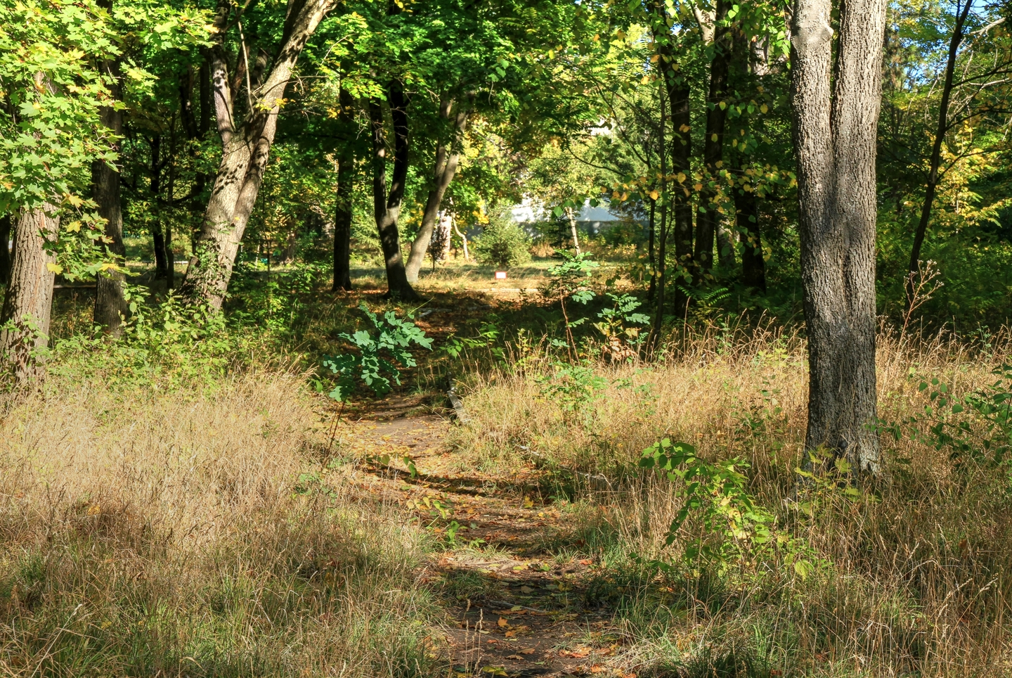 Милештский парк, монумент природы, находится в Ниспоренский район, с. Милешть (код MD-NS-map-016)